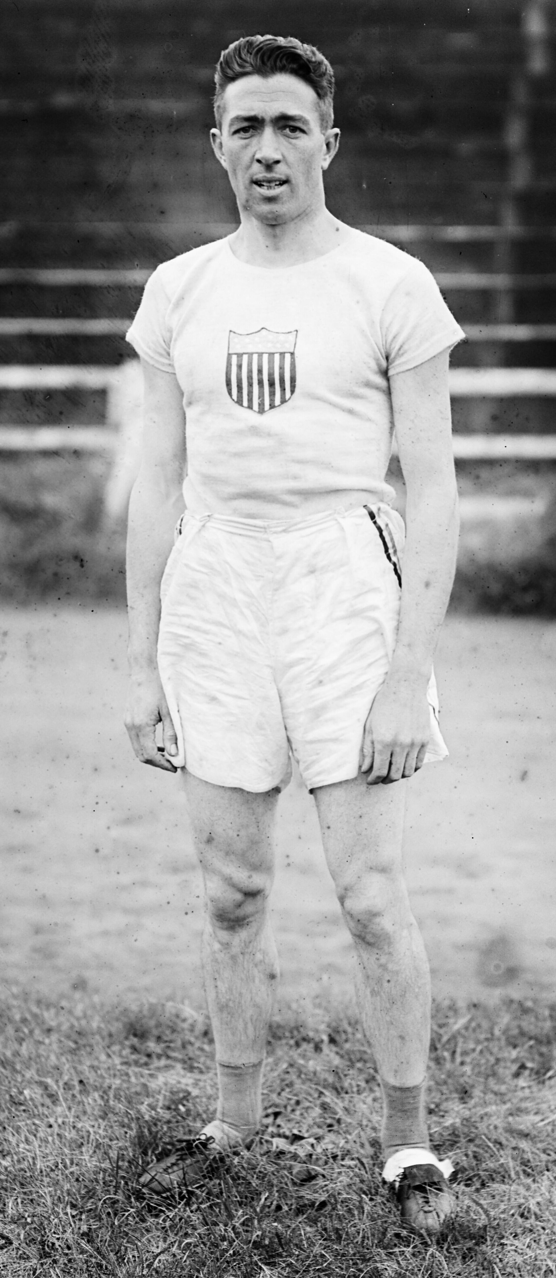 28-8-20, Colombes, [William] Meanix (Amé[ricain]) [vainqueur d'un] 400 m haies : [photographie de presse] / [Agence Rol]